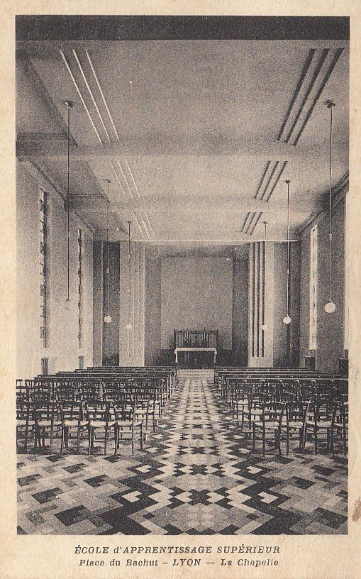 Ecole d'apprentissage supérieur - Place du Bachut - LYON La chapelle